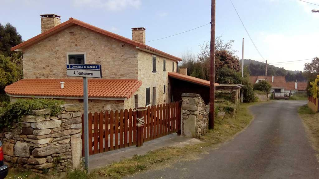 Vista da Fontenova, Cabanas.